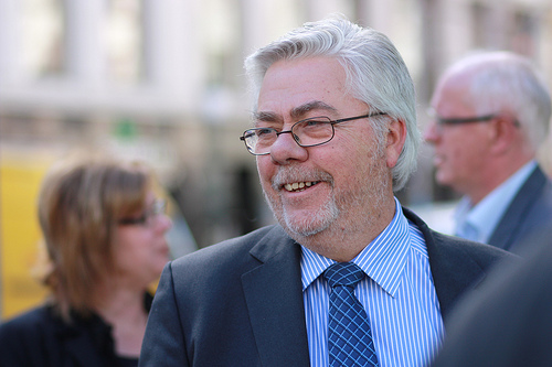 Sigvald Oppebøen Hansen